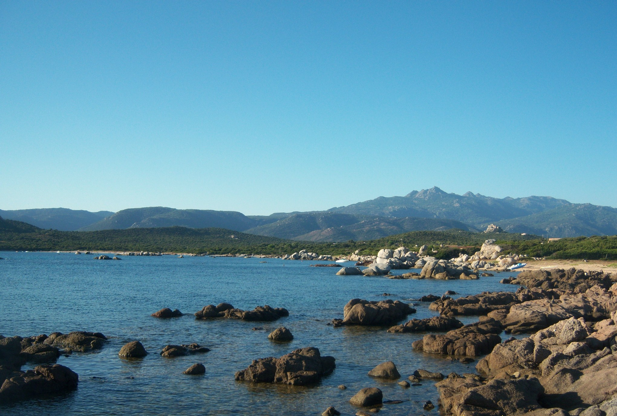 Baie de Chevanu